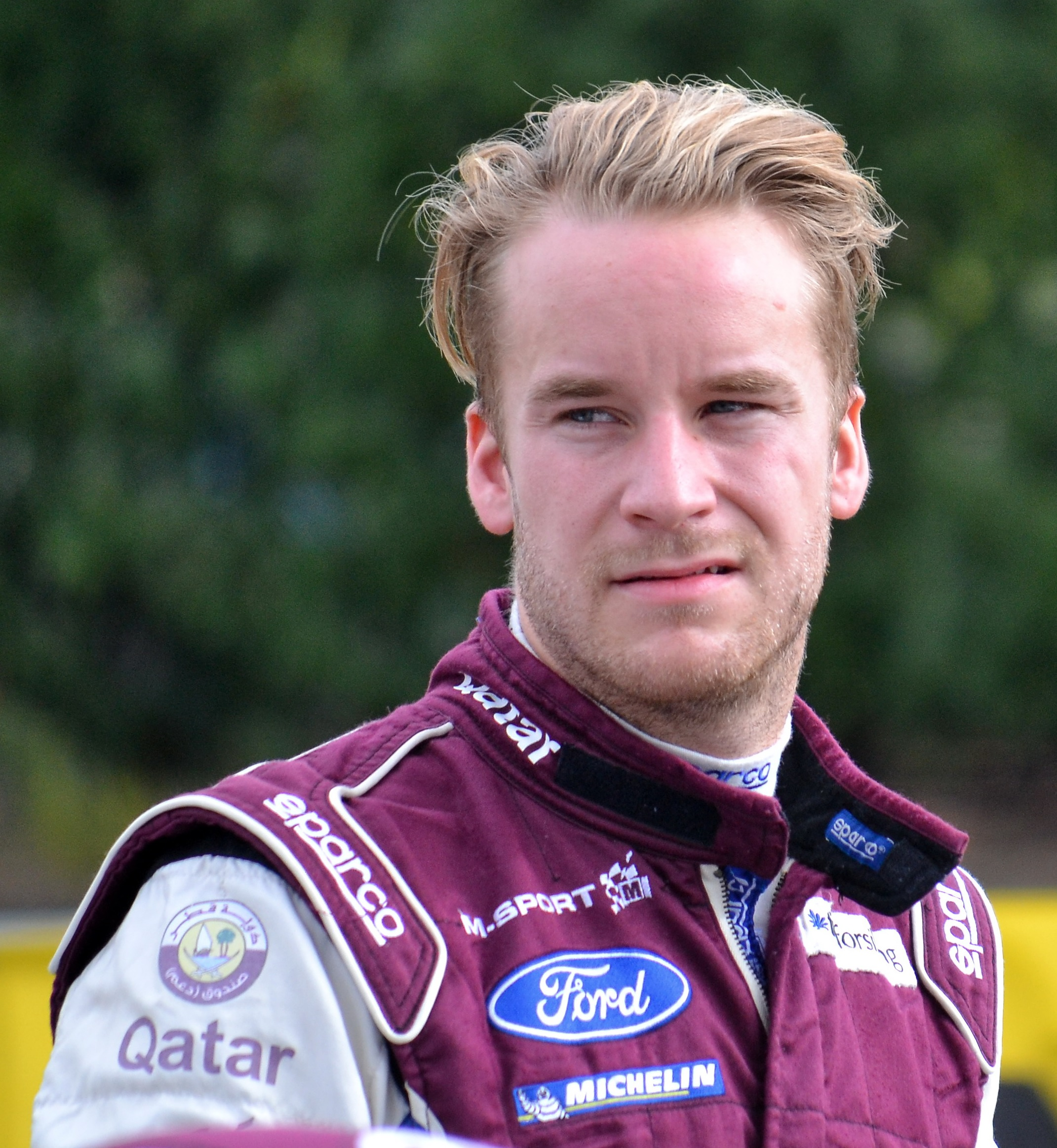 Mads Østberg au parc d'assistance de Colmar durant le Rallye de France-Alsace 2013.